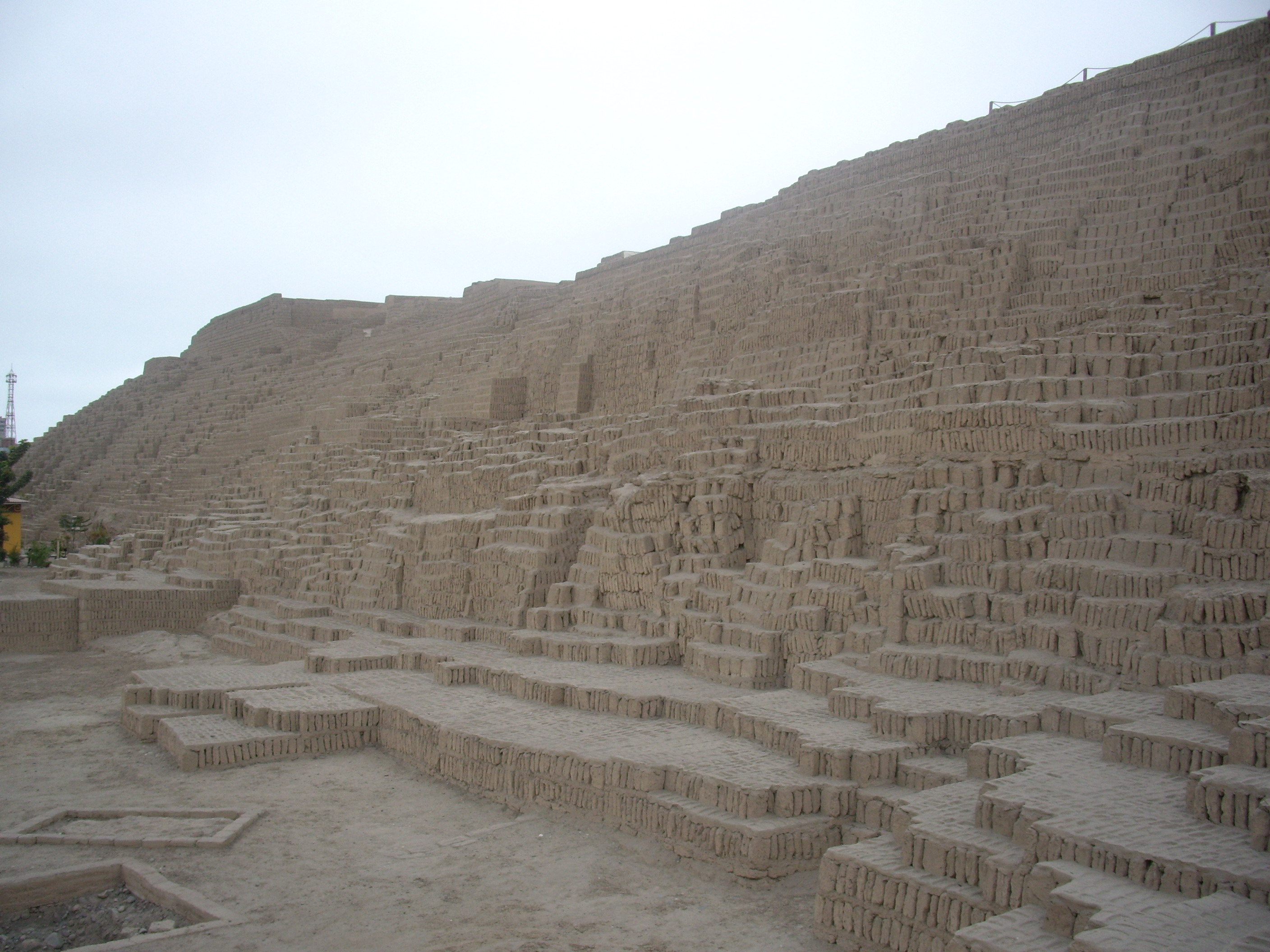 Lloc arqueologic de Huaca Pucllana (Miraflores, Lima)